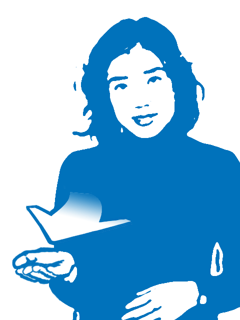 日本手話の「ですか００１」2007.04,04.-Yokohama.B